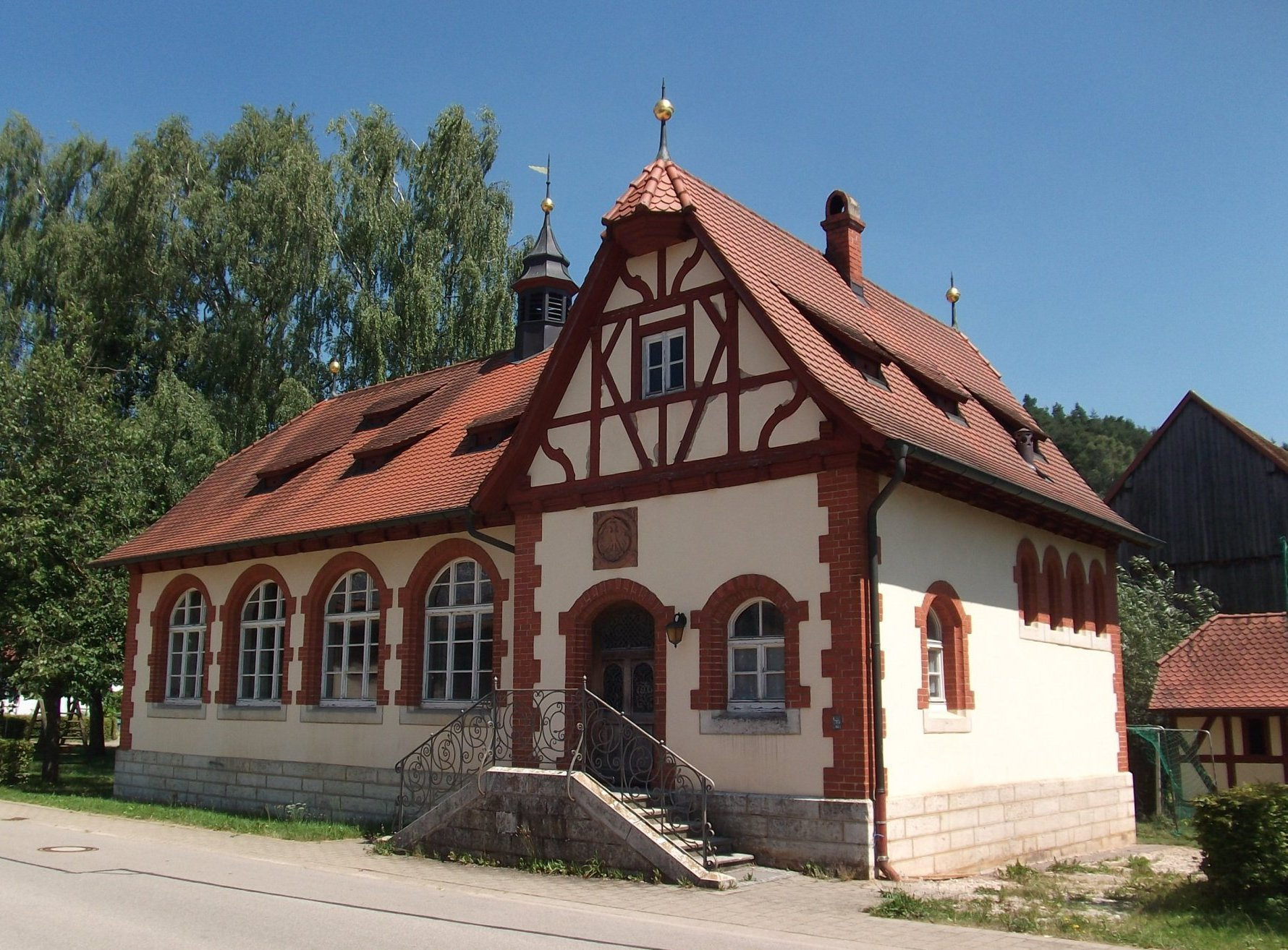 Ehemaliges Schulhaus von 1897in Schwimbach